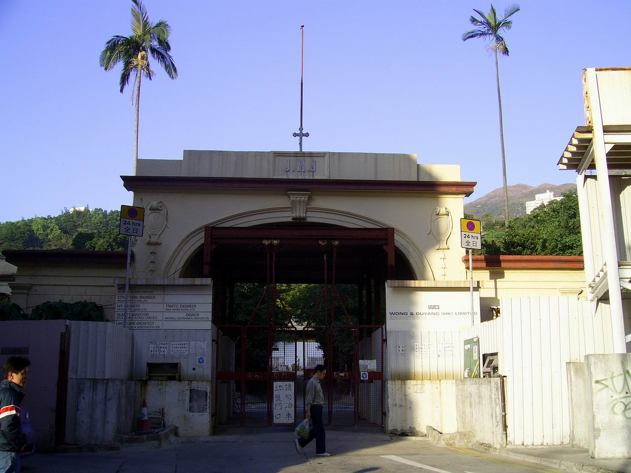 中文（香港）: 聖若瑟安老院門樓